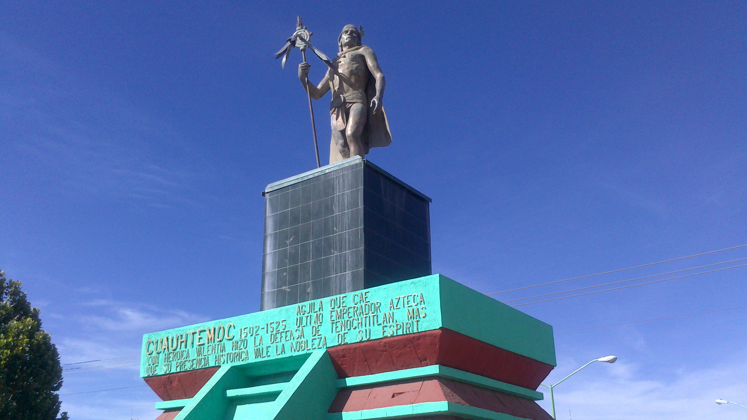 La estatua mas representativa de Cuauhtémoc, Chihuahua.